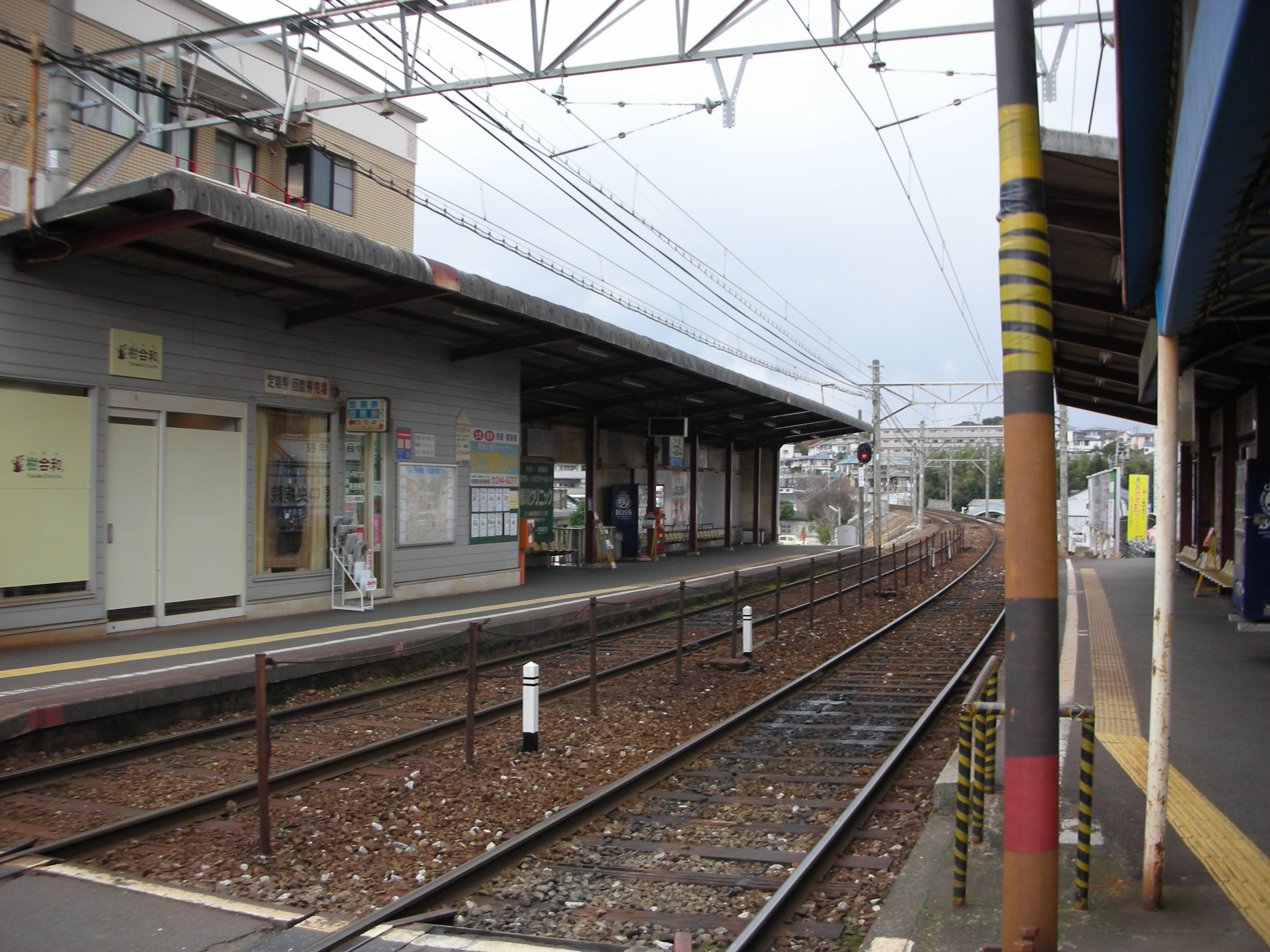 2006/12/28におんさか自身が撮影。三ヶ森駅。